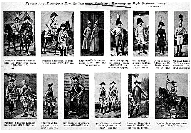 Эти изображения были использованы для иллюстрирования статьи «Кирасирский, лейб-гвардии Ее Величества Государыни Императрицы Марии Федоровны, полк» опубликованной в двенадцатом томе «Военной энциклопедии», который был издан книгоиздательским товариществом И. Д. Сытина в 1913 году в столице Российской империи городе Санкт-Петербурге. Более подробное описание можно прочесть в указанной выше статье. Эти же рисунки в большем разрешении можно увидеть здесь.